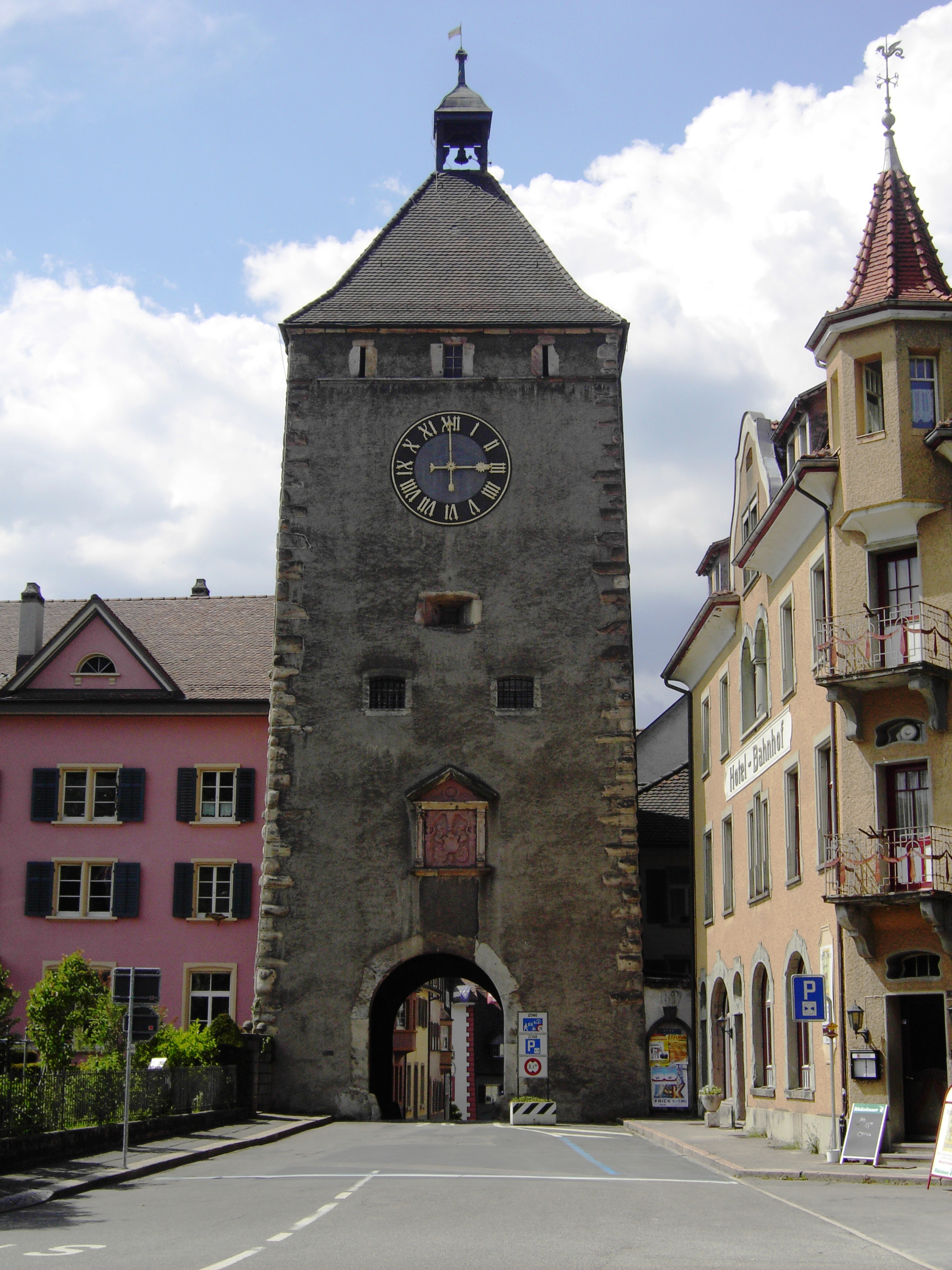 Stadttor in Laufenburg AG, Schweiz